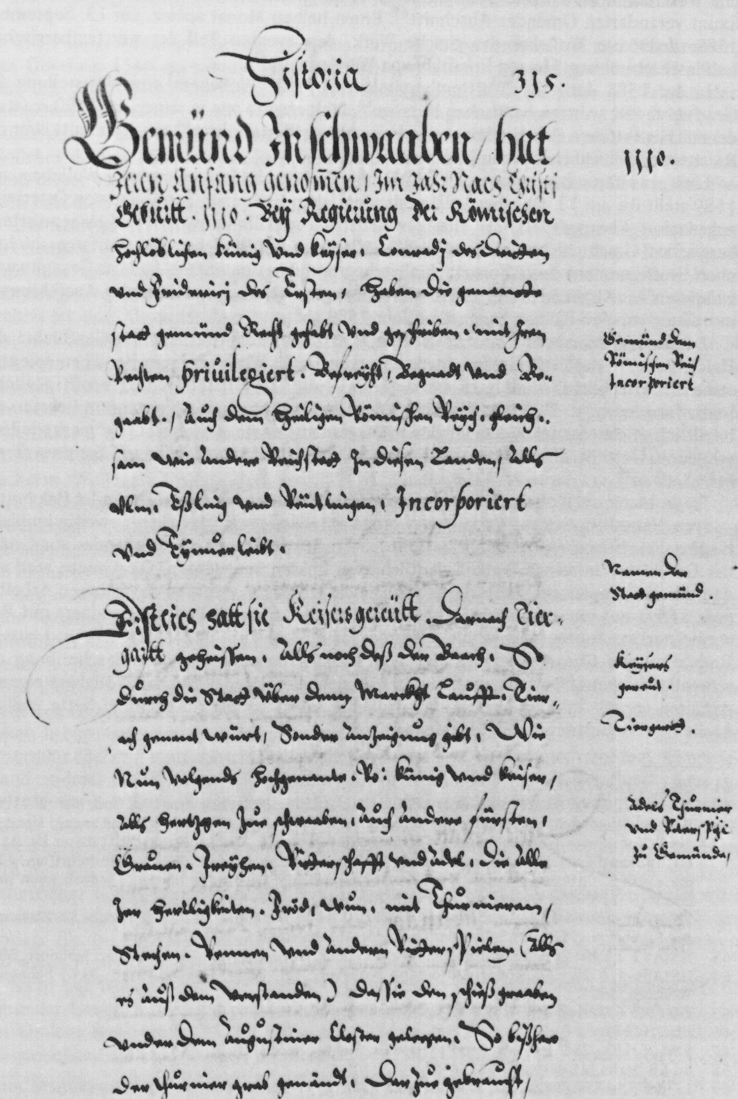 Eigenhändige Niederschrift David Wollebers